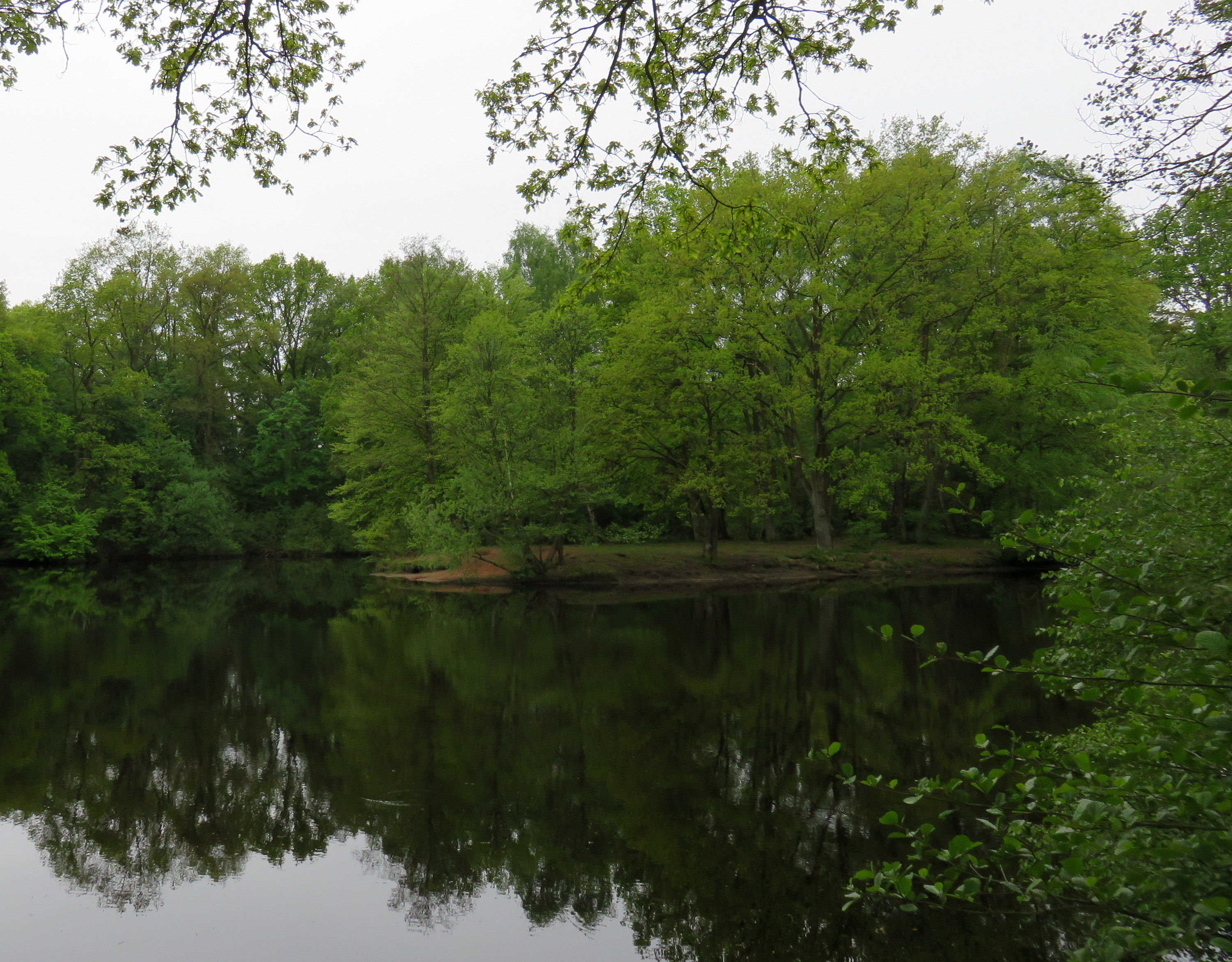 Rotes Ufer am Kupferteich im LSG Hummelsbütteler Feldmark/Alstertal (Hamburg-Poppenbüttel/Hamburg-Lemsahl).